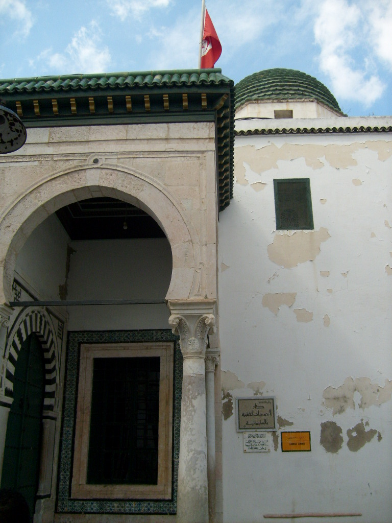 Entrée de la médersa Slimania dans la médina de Tunis (Tunisie)